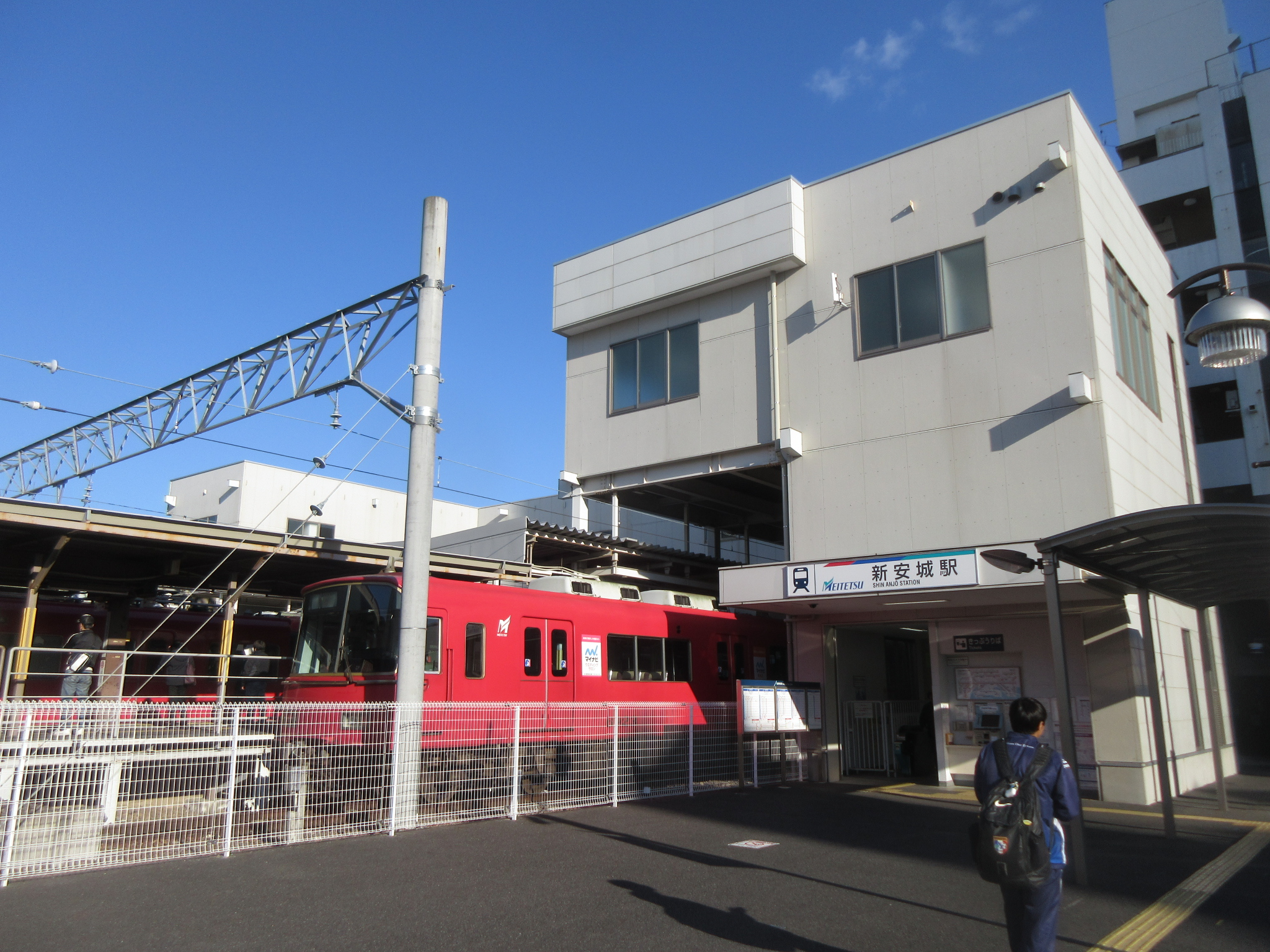 名鉄「新安城駅」南口のエレベータ専用改札口。